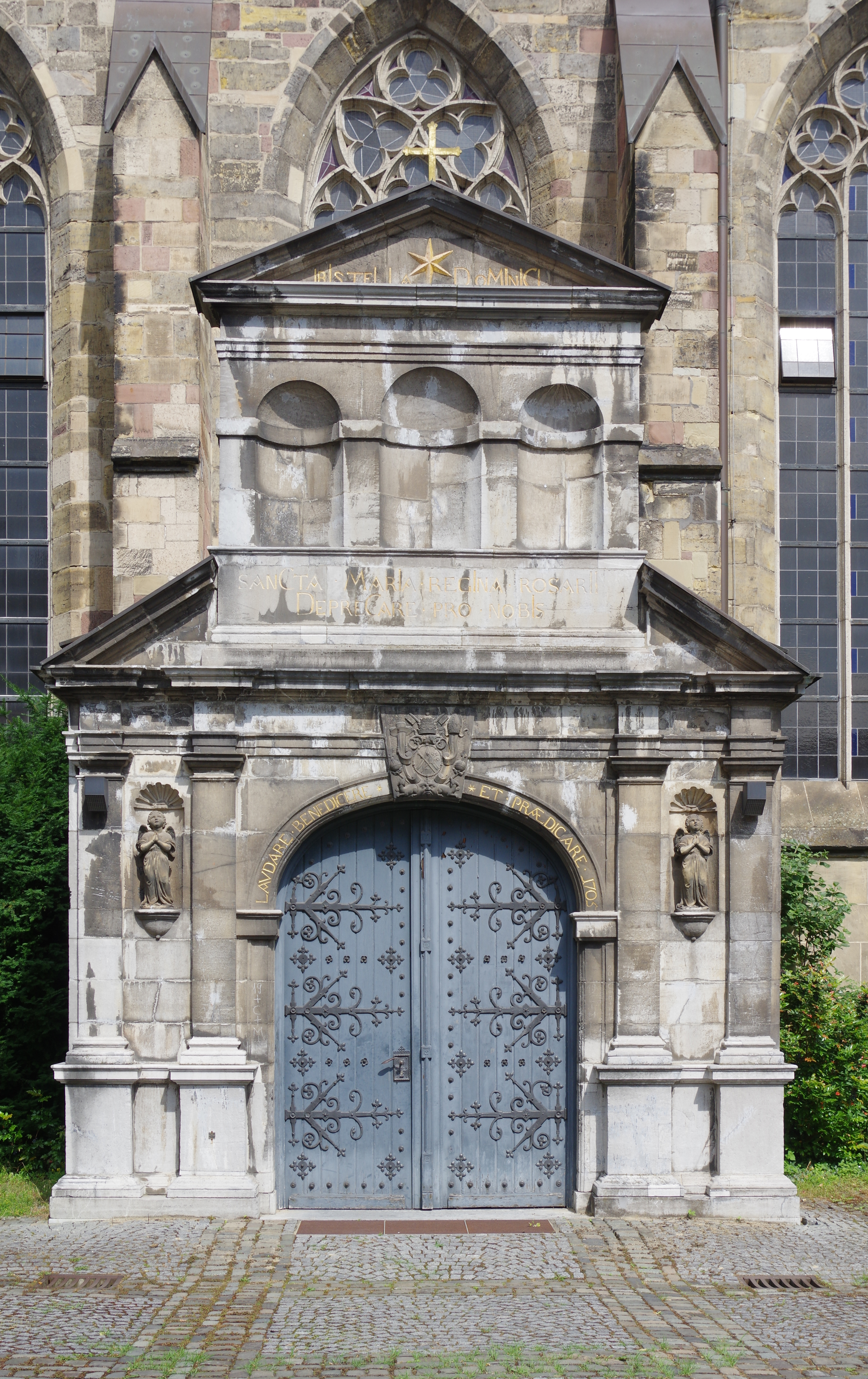 Aachen, Eingang St. Paul